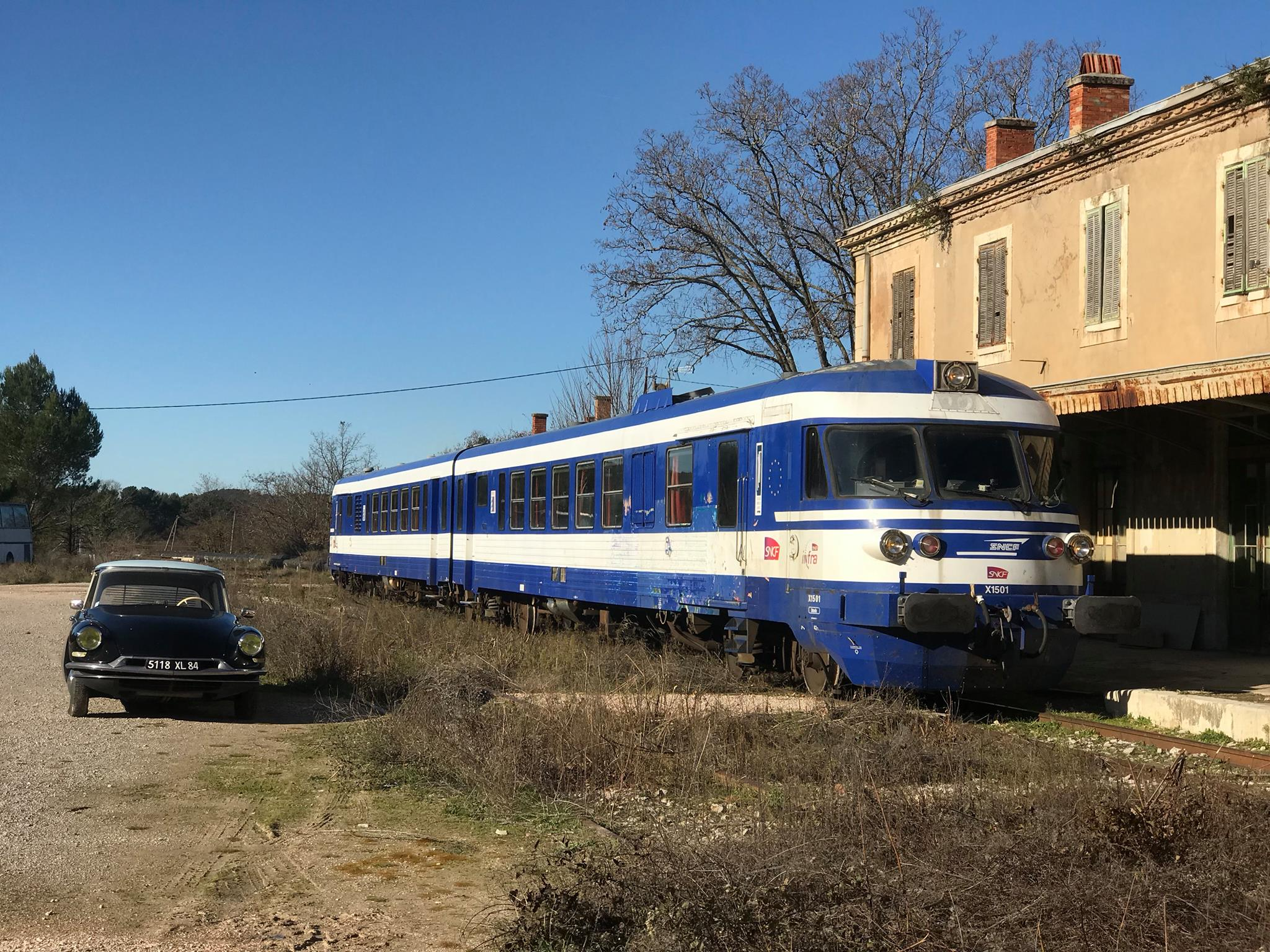 Autorail X1501 en gare de La Barque-Fuveau